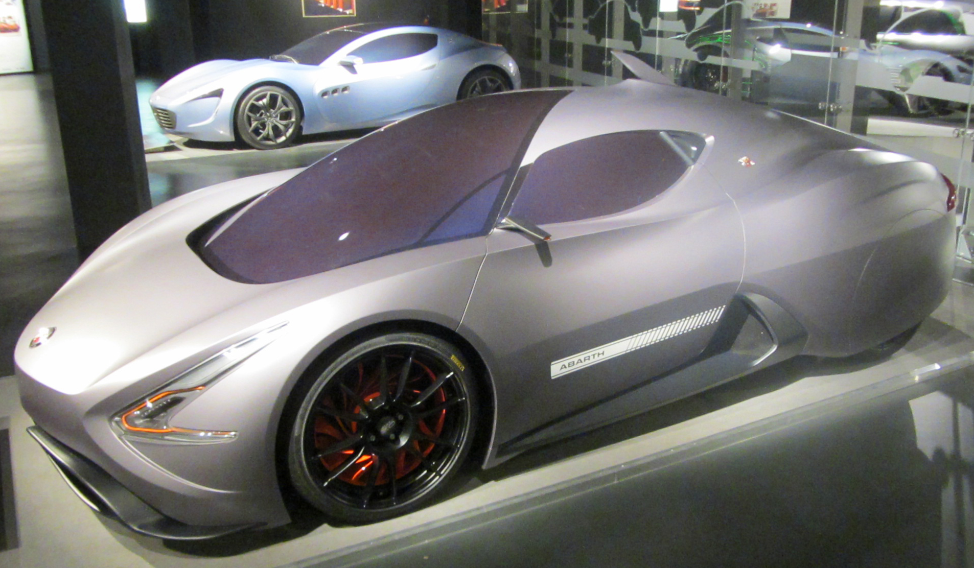 (in primo piano) Abarth Scorp-ION concept by IED Torino (secondo piano) Maserati Chicane concept by IED Torino